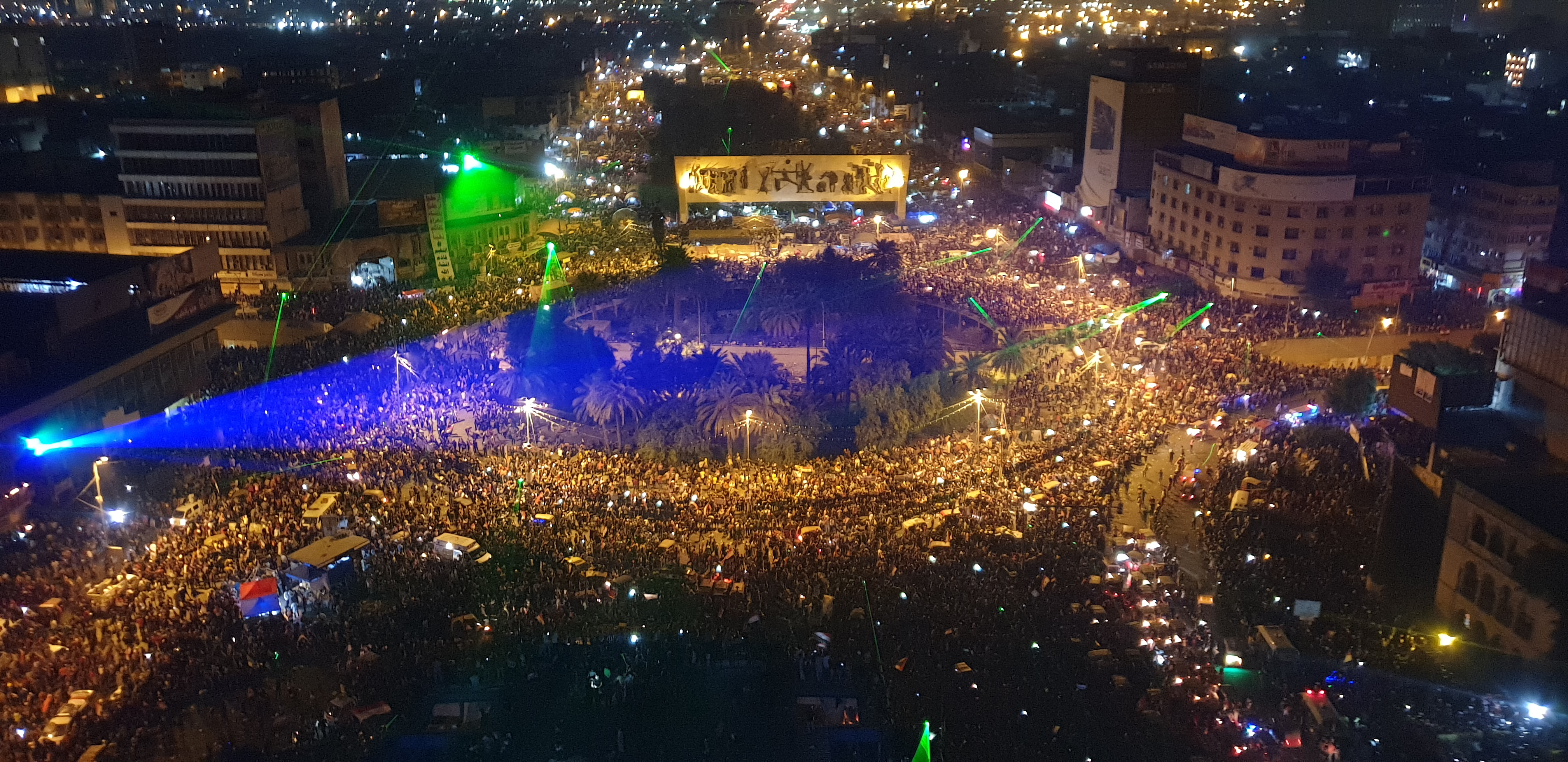 صورة لساحة التحرير من أعلى بناية (المطعم التركي) تظهر حشود المتظاهرين 1 نوفمبر 2019